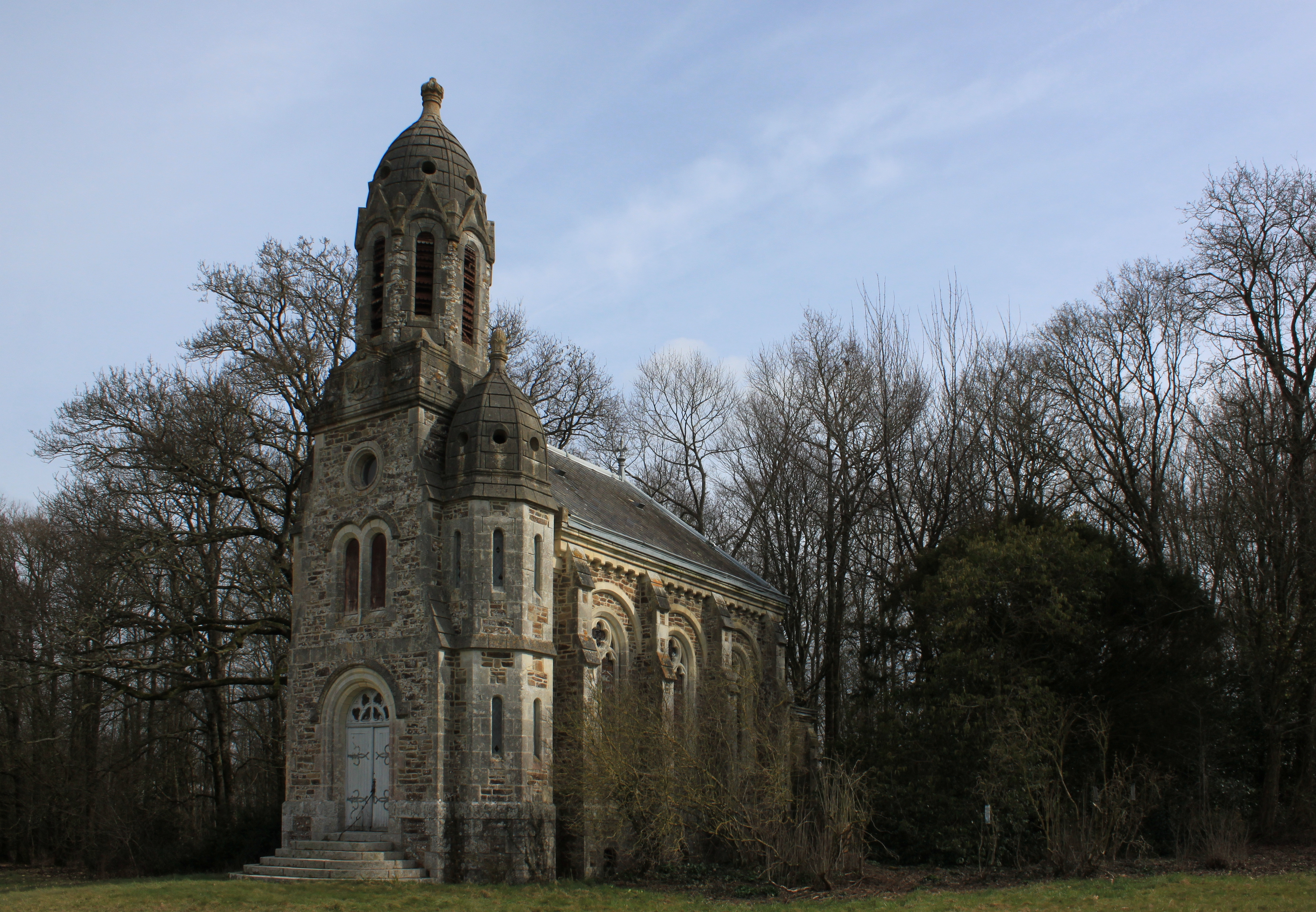 Chapelle (1900), château du Hallay, Fr-85-Boufféré.